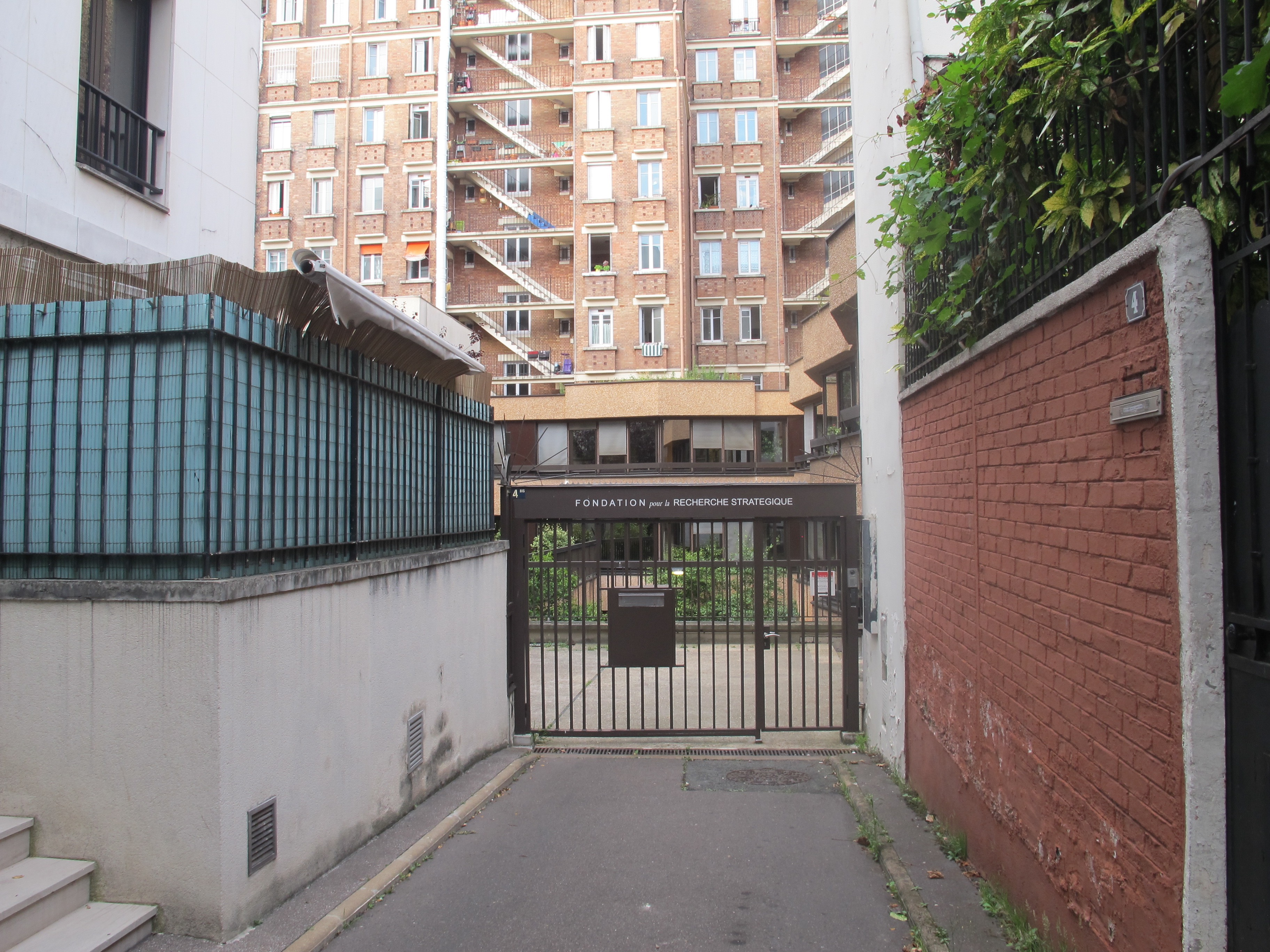 Siège de la Fondation pour la recherche stratégique, villa des Glizières (Paris, 16e).